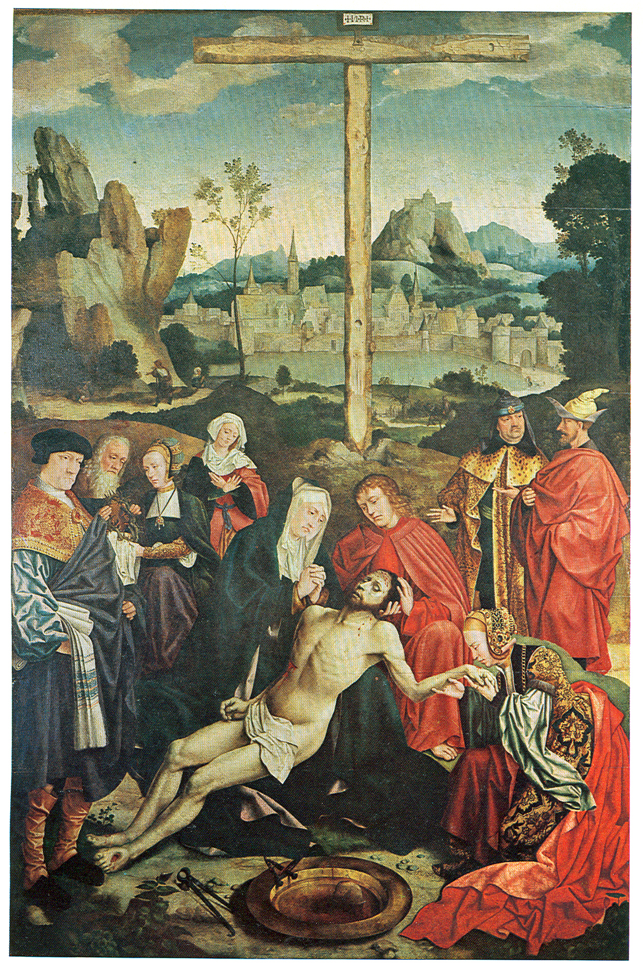 Altartafel